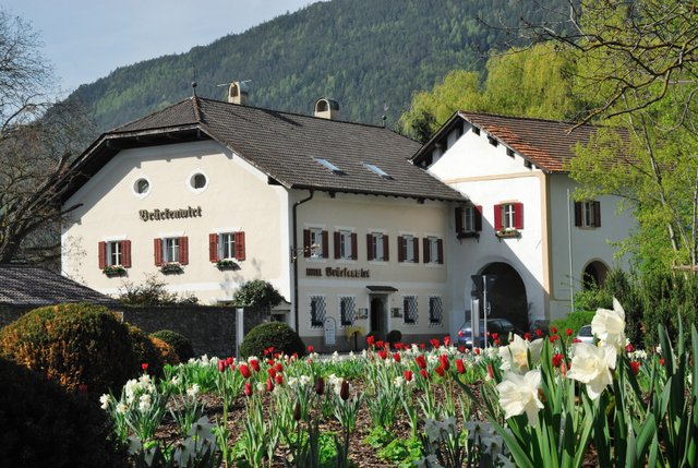 Hotel und Restaurant Brückenwirt (Neustift bei Brixen, Südtirol). Erfasst als Baudenkmal der Autonomen Provinz Bozen Südtirol. Object location46° 44′ 29.43″ N, 11° 38′ 50.41″ E